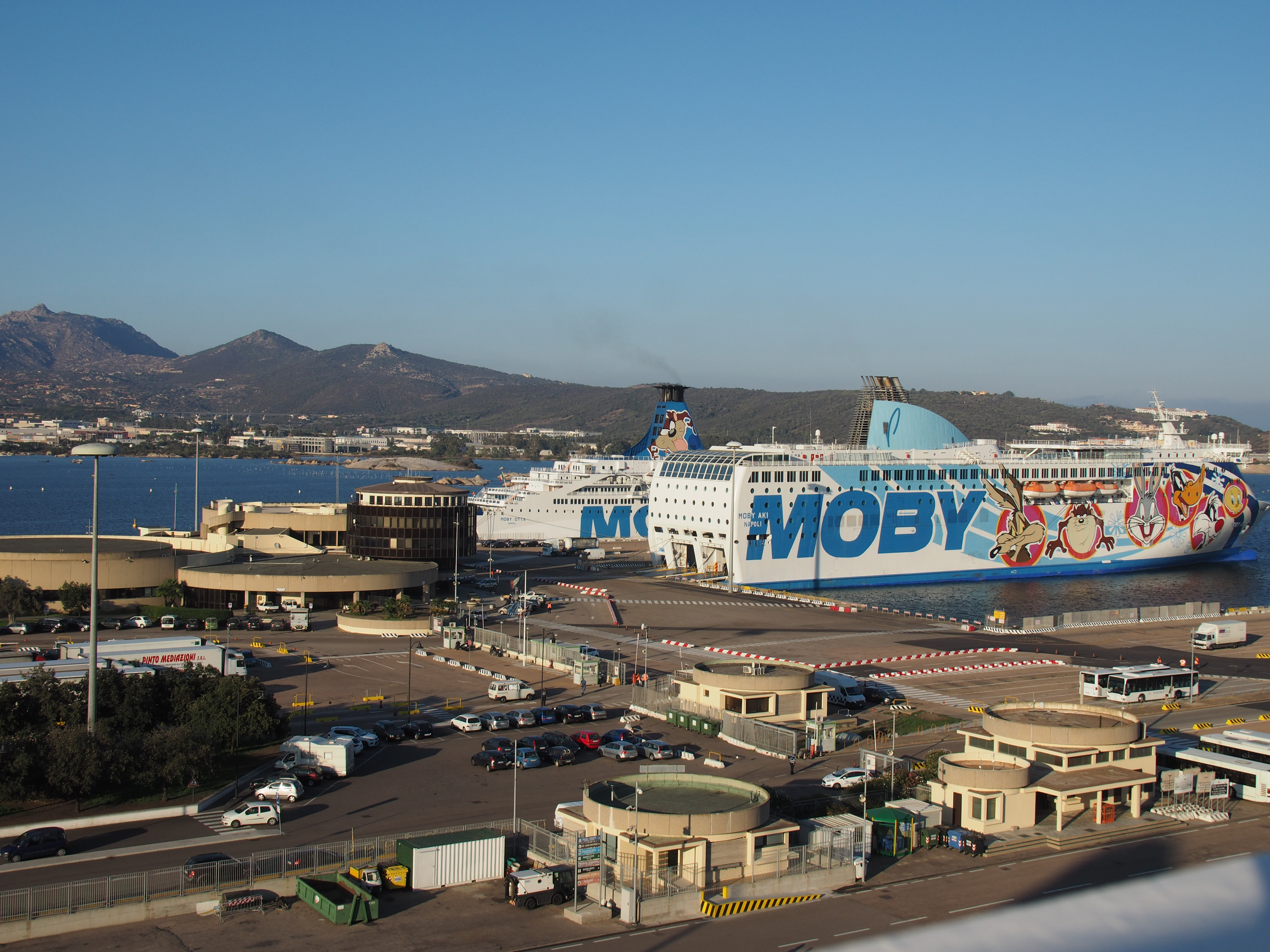 Fährhafen von Olbia (Sardinien)